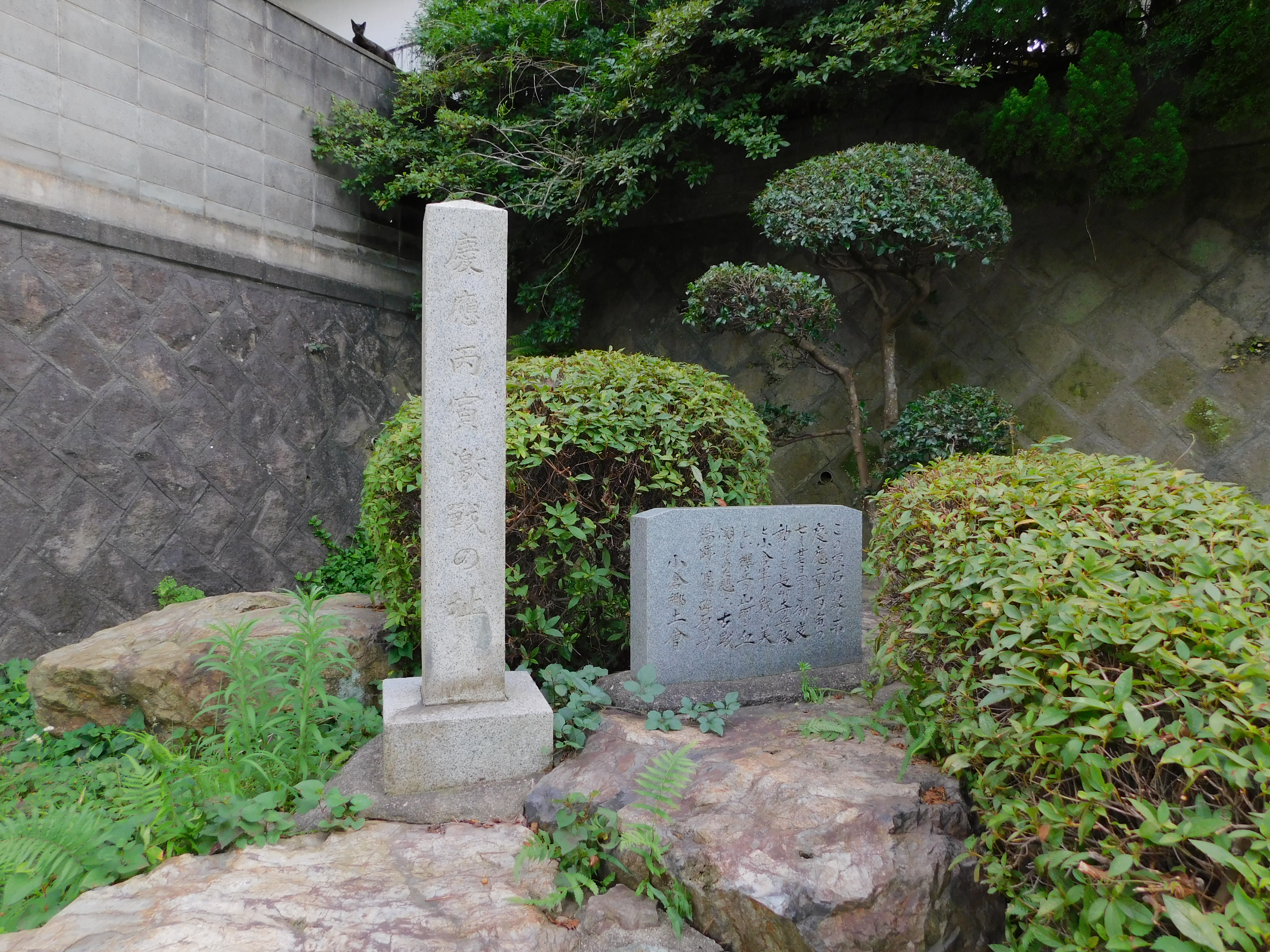 2019年7月23日撮影